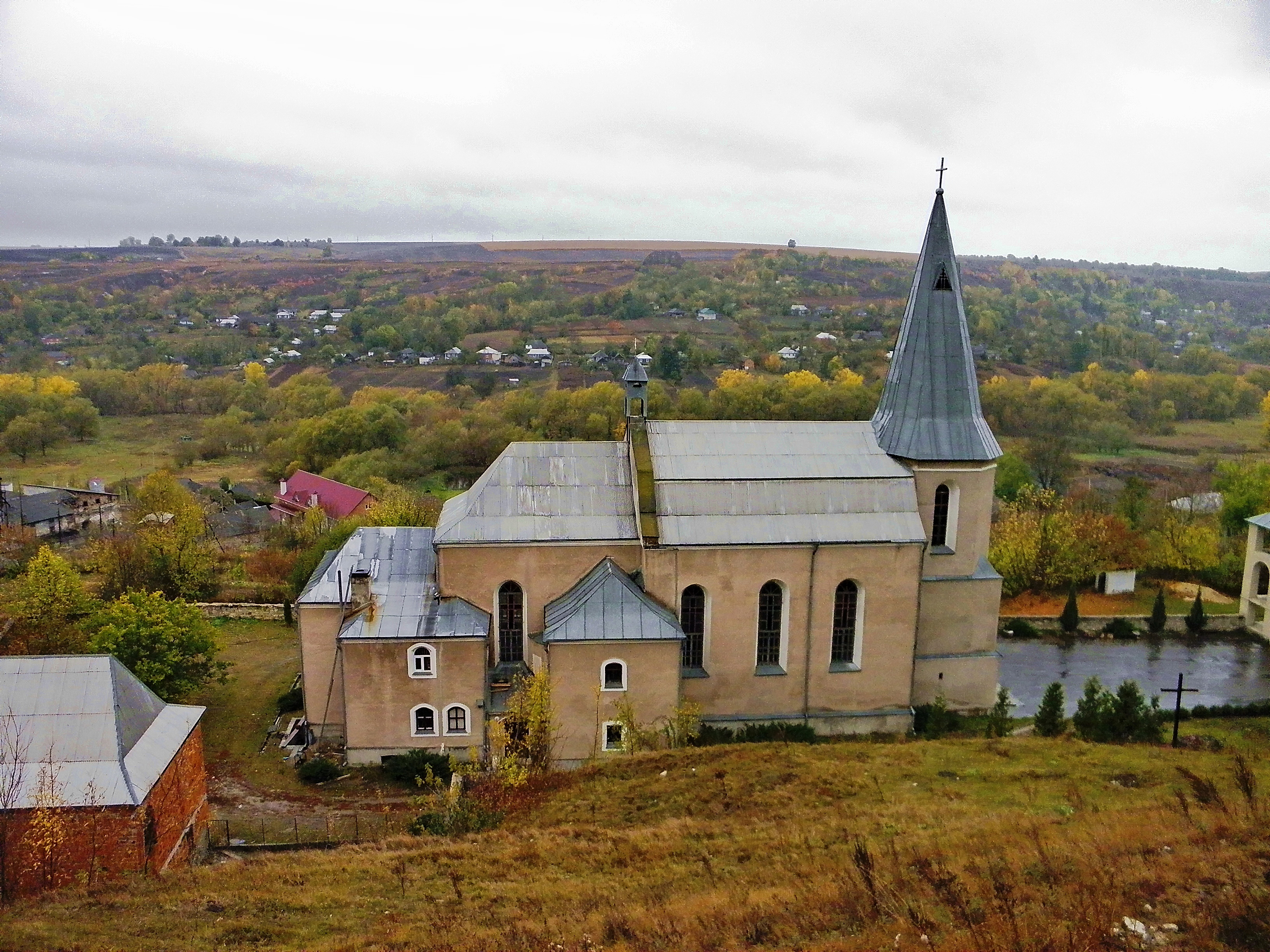 Костел Св.Трiйцi (мур.), Зинькiв